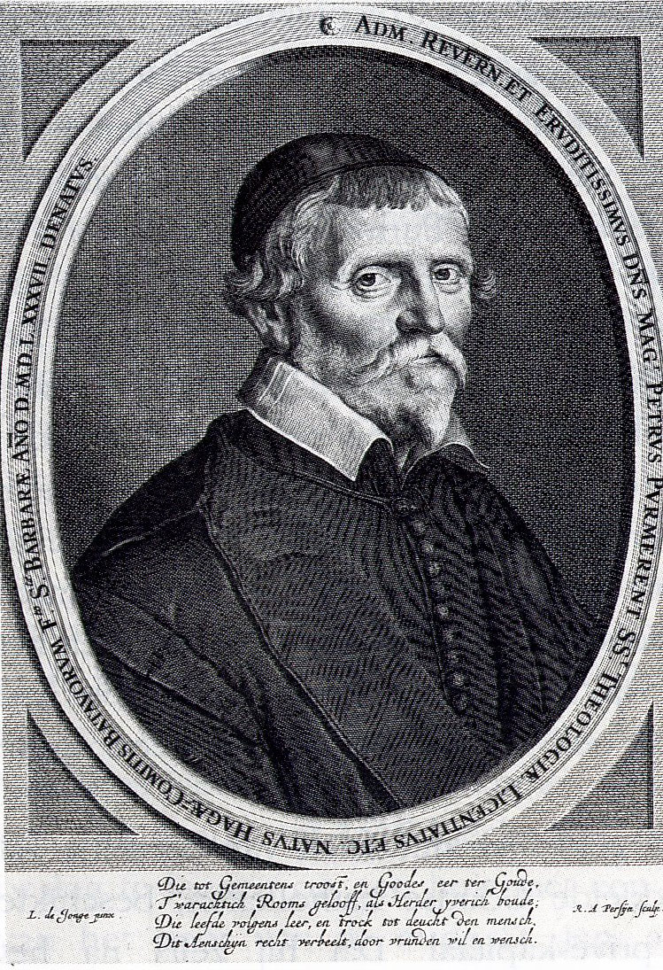 Gravure van Petrus Purmerent door Reinier van Persijn naar Ludolf de Jongh (1616-1679)